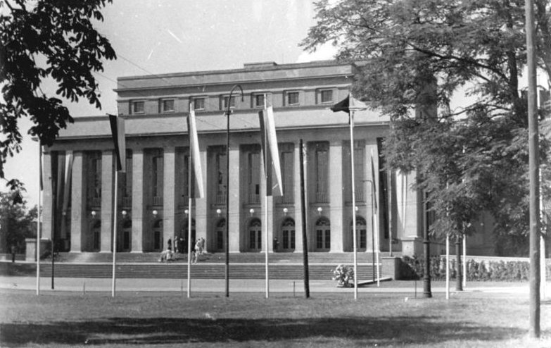 Dessau, Landestheater Eröffnung des Landesthaters in Dessau. Am 20.8.49 wurde das Landestheater von Dessau wiedereröffnet und damit die größte und modernste Bühne Deutschlands der Öffentlichkeit übergeben. Die einleitenden Worte zu der Festvorstellung der "Zauberflöte" sprach Ministerpräsident Dr. Hübner. UBz: Das anlässlich der Einweihung festlich geschmückte Landestheater. Zentralbild-Kemlein Ho. 3769-49 22.8.49